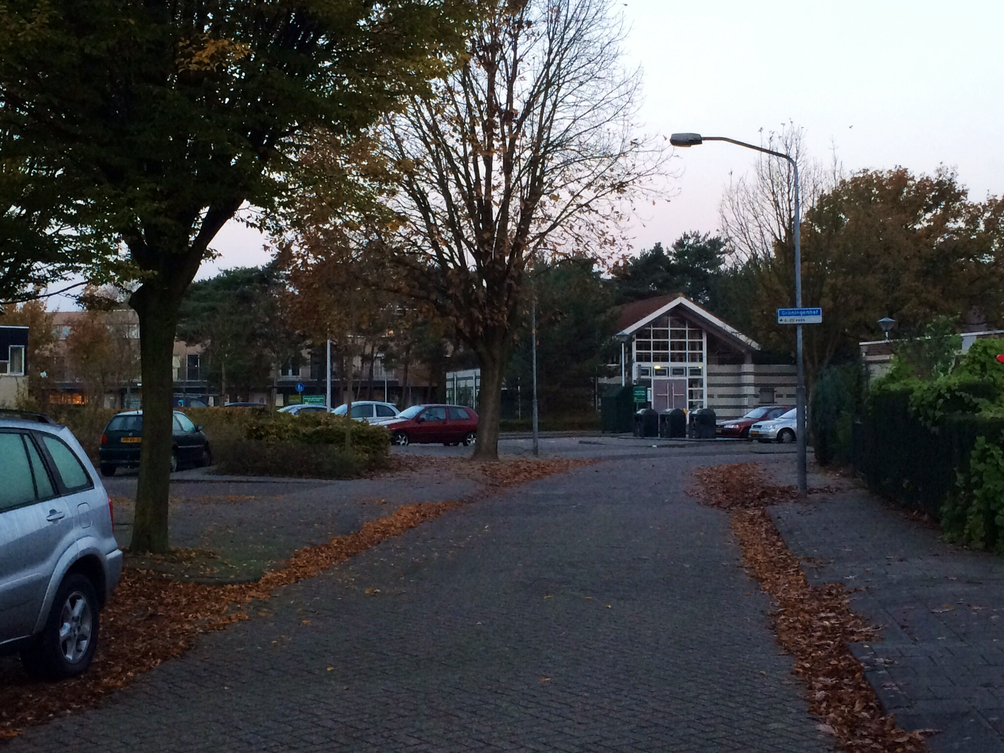 De Groningenhof in de Helmondse wijk Rijpelberg met onder meer de kerk.